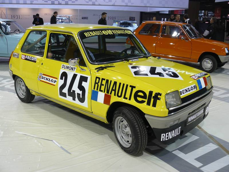 Retromobile 2012